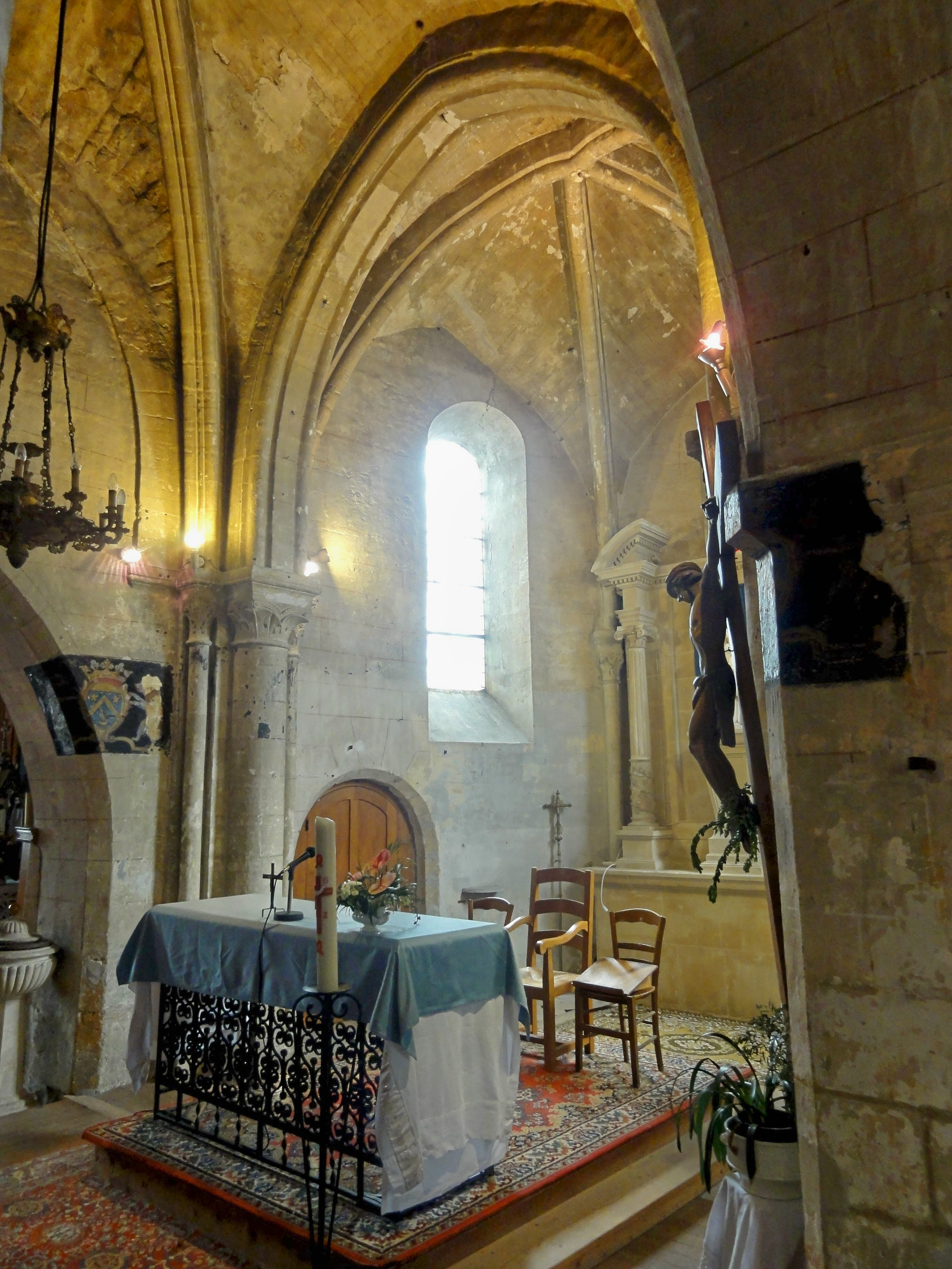 Chœur.